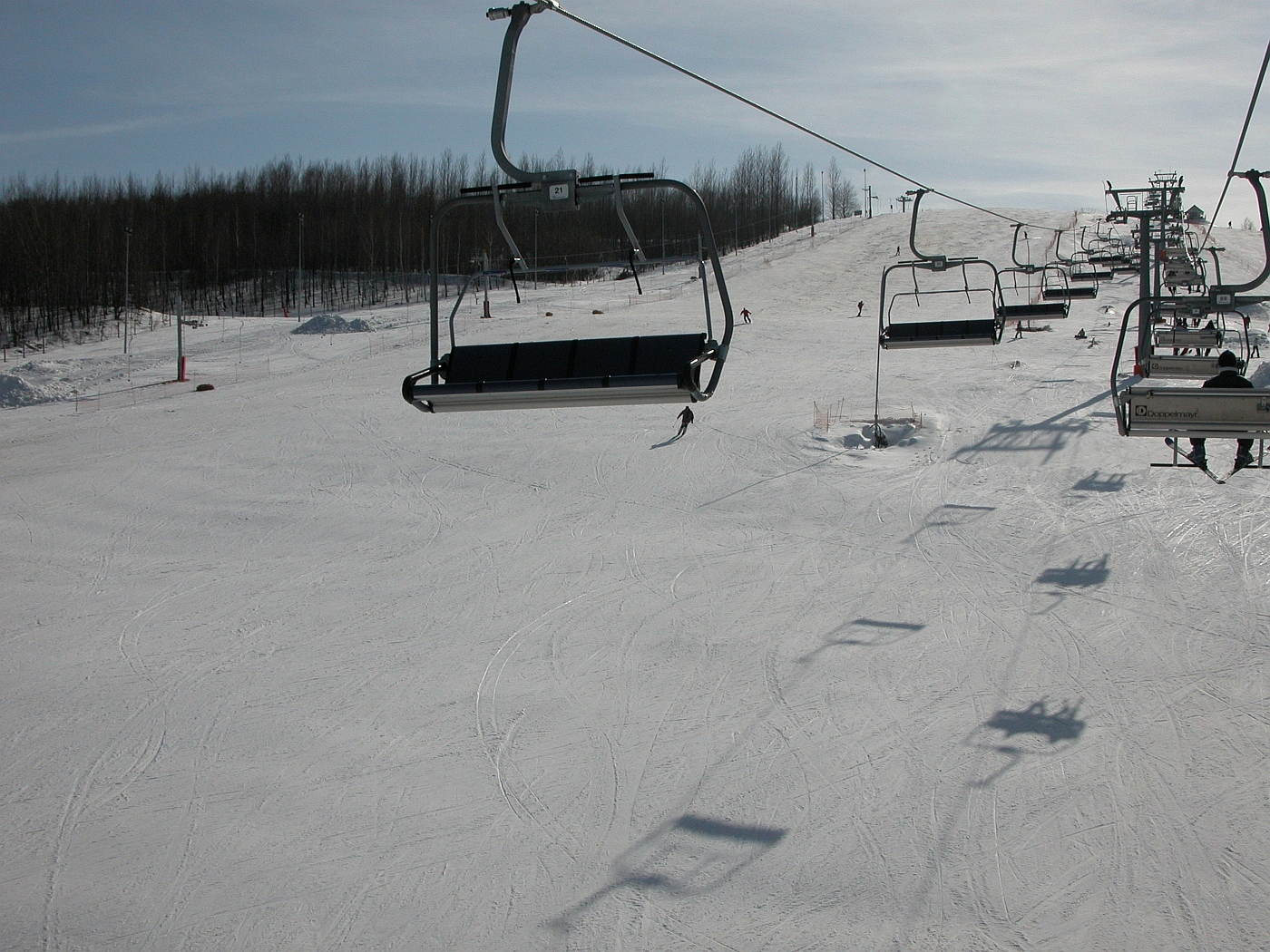 Góra Kamieńsk - nartostrada na zboczu zwałowiska Kopalni Węgla Brunatnego Bełchatów.